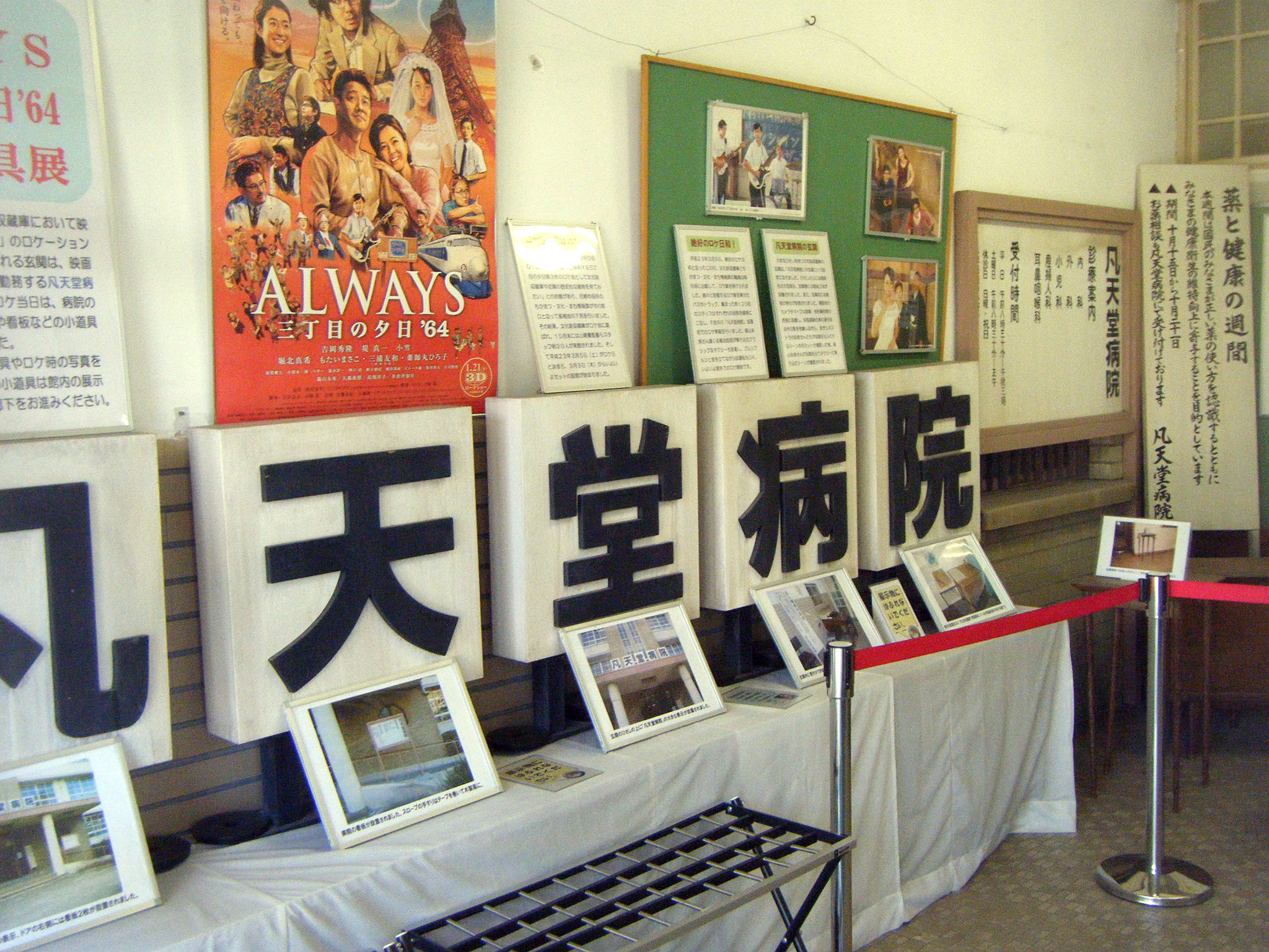 尼崎市文化財収蔵庫 玄関ホール展示 映画『ALWAYS 三丁目の夕日'64』ロケ小道具 ※撮影可の掲示あり